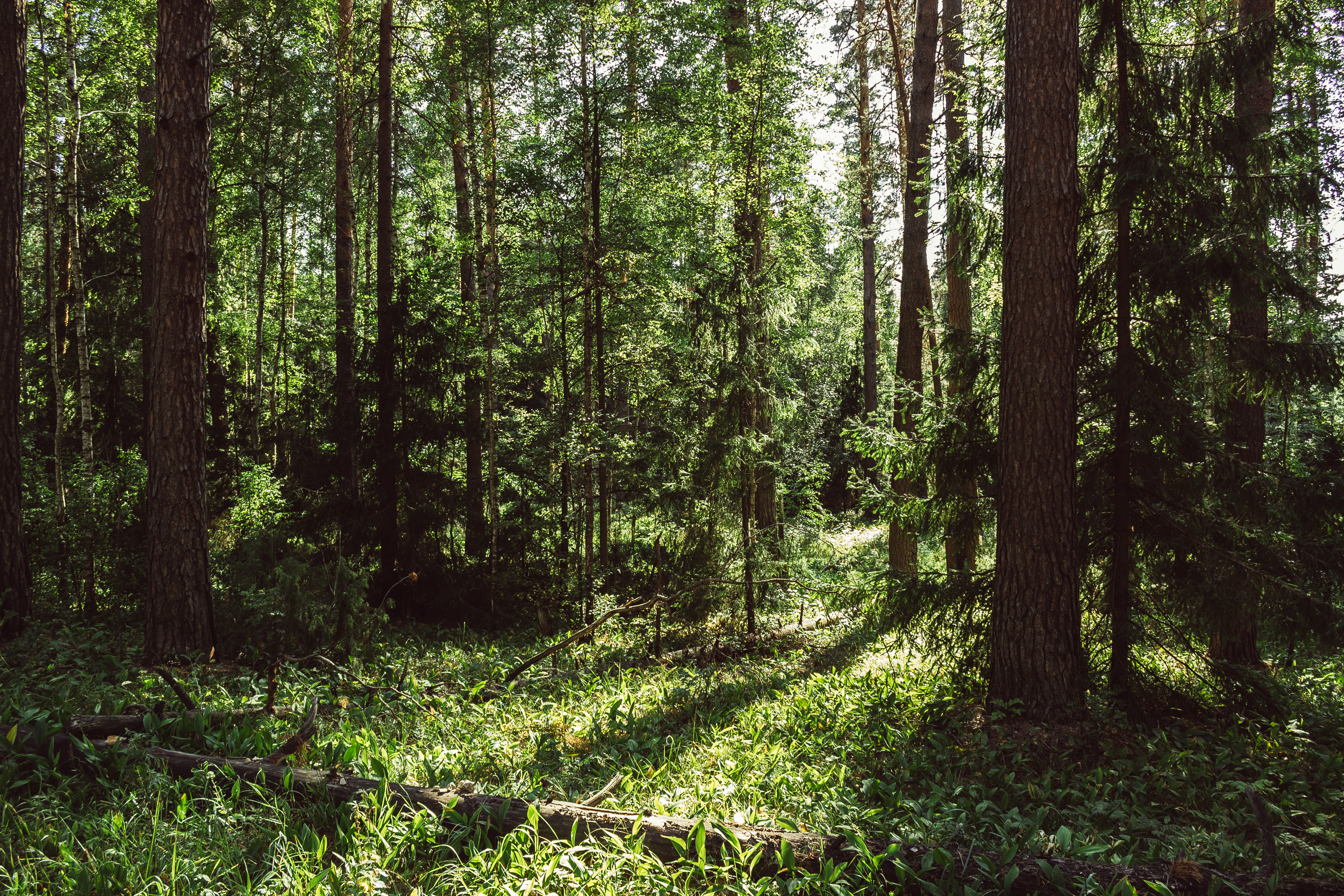 Волжско-Камский заповедник, Зеленодольский район This image is related to the protected area of Russia number 1600082